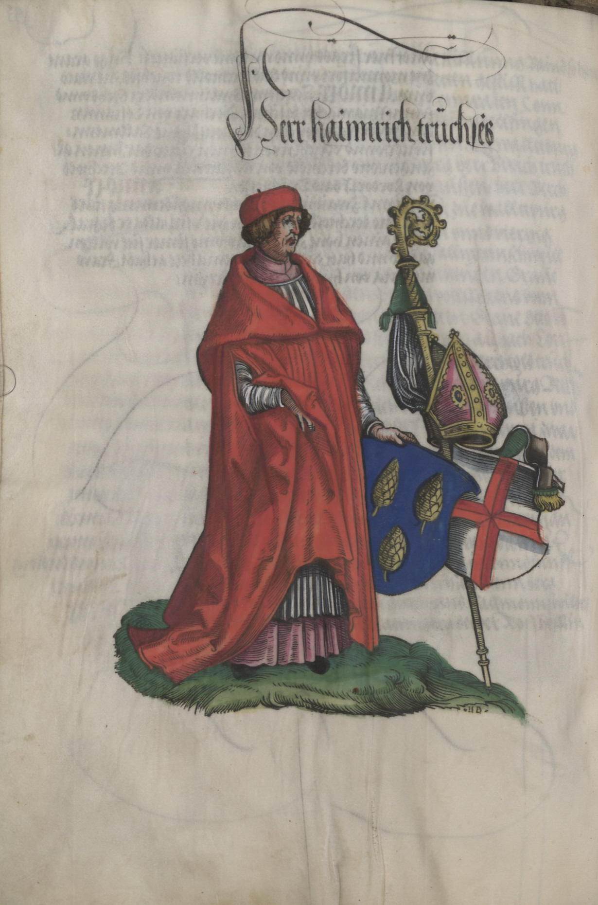 Holzschnitt aus der Chronik der Truchsessen von Waldburg (Truchsessenchronik) in der Pergamenthandschrift der Württembergischen Landesbibliothek Stuttgart (ehemals Fürstl. Bibliothek Donaueschingen), Cod. Don. 590 herr hainnrich truchsess